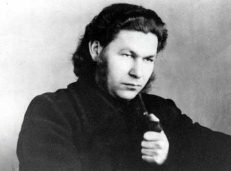 Kostas Kubilinskas